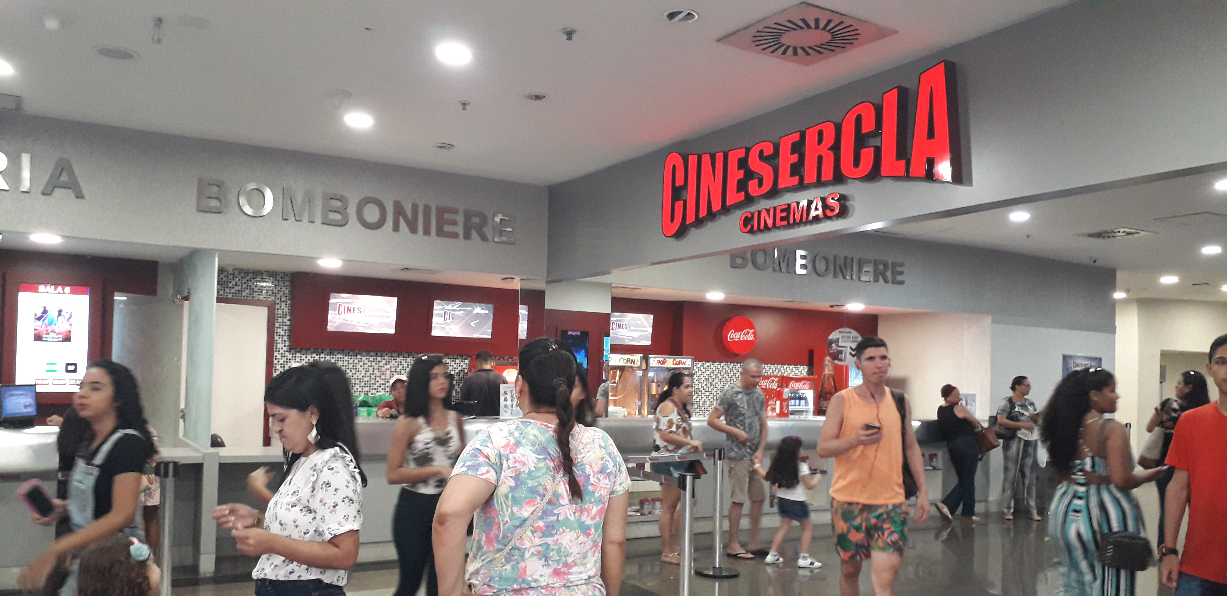 Imagens do complexo de cinemas Cinesercla Shopping Tambiá, instalado no centro comercial do mesmo nome, na cidade de João Pessoa, PB